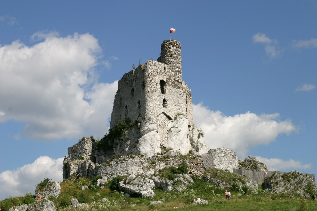 Zamek Mirów